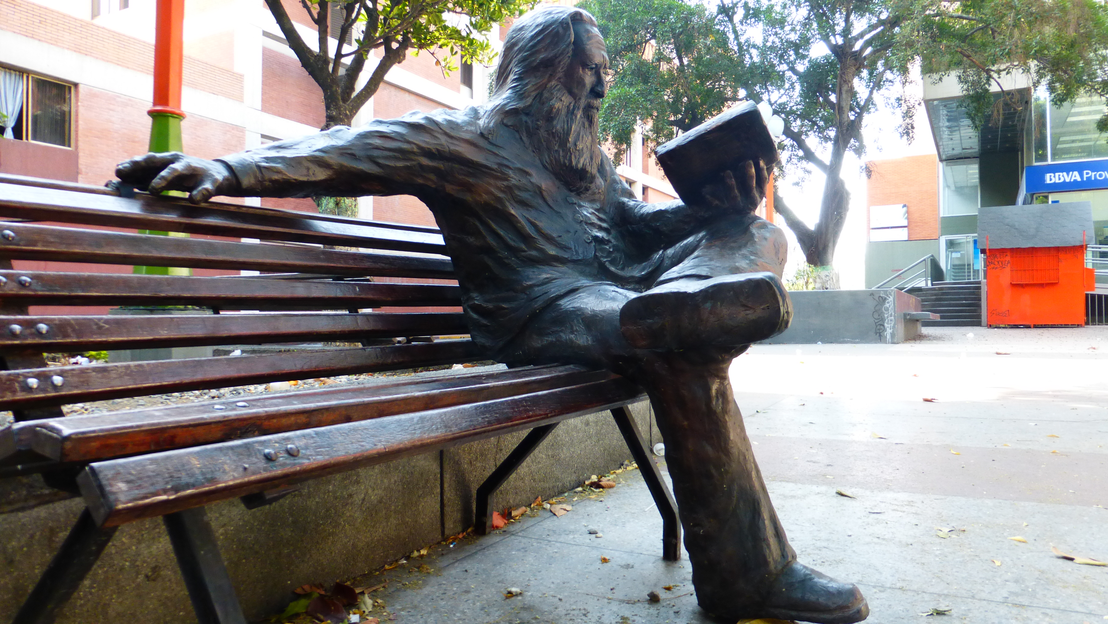 Estatua de Salvador Garmendia en Barquisimeto.